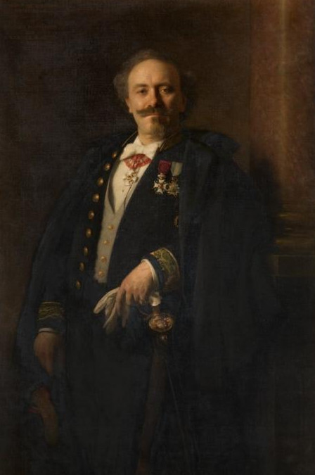 Jean-Jacques Winders (1849-1936)